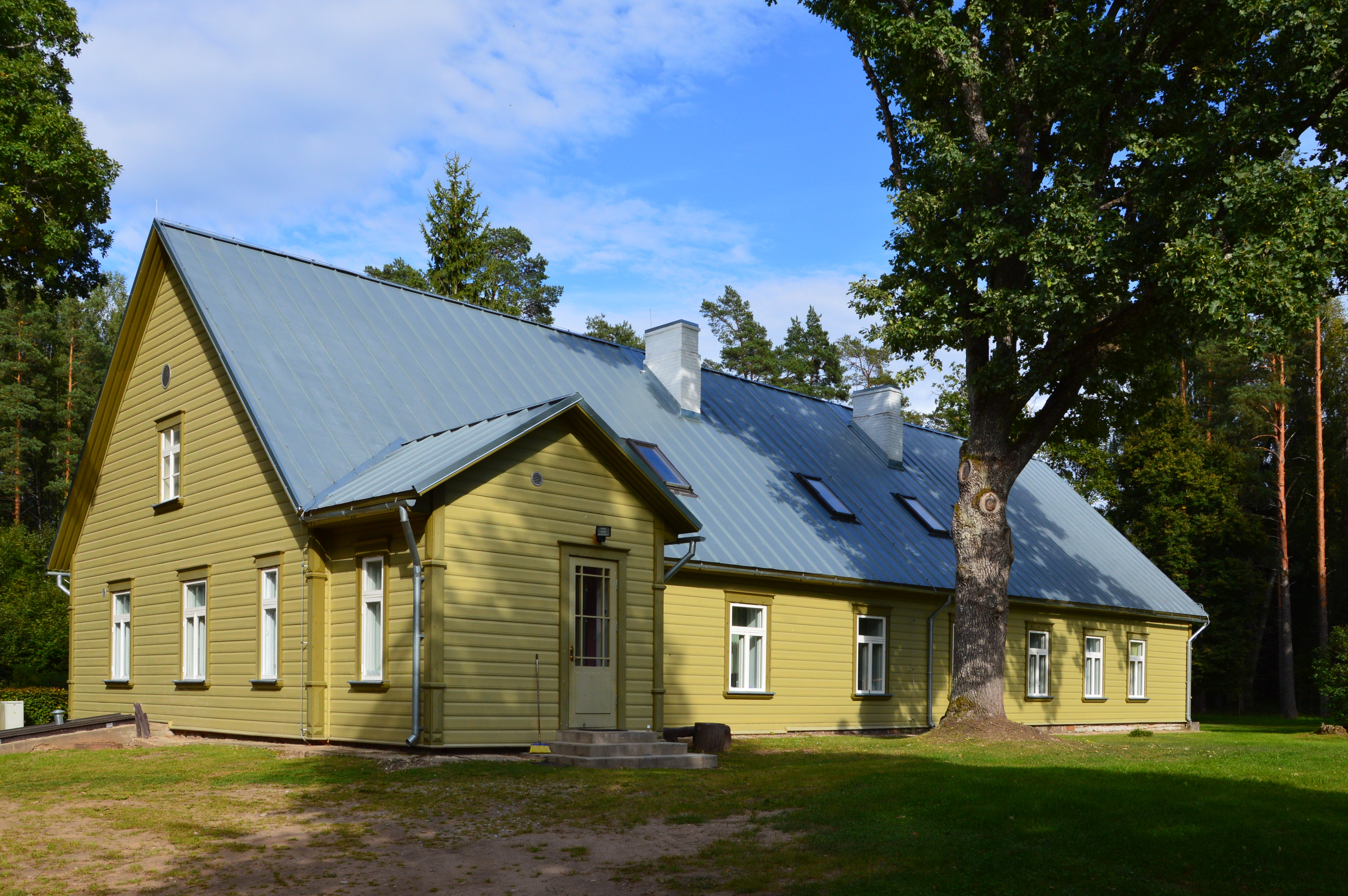 Taheva mõisa metsniku elamu